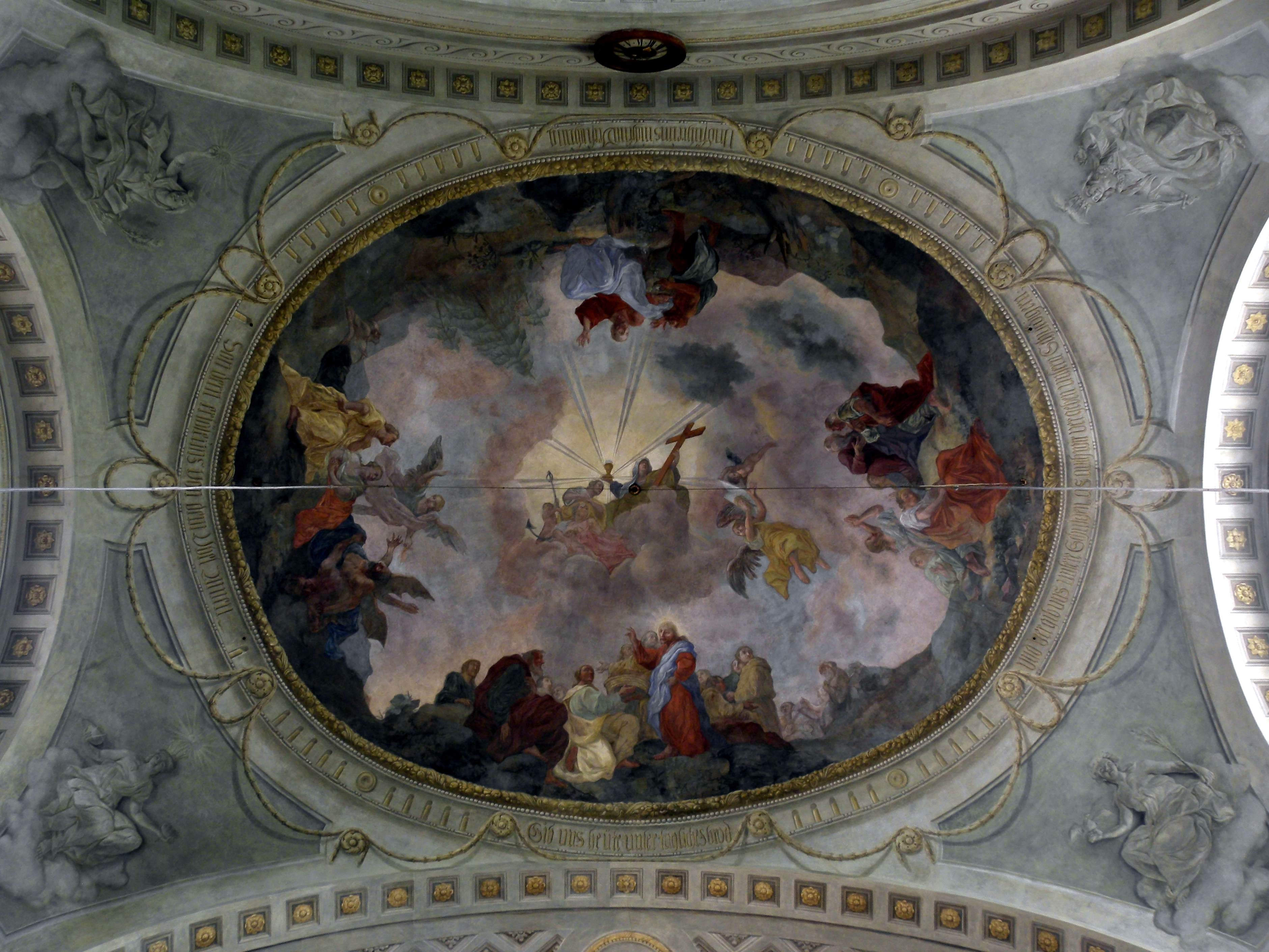 Die Kuppelfresken im Hauptschiff der Lichtentaler Pfarrkirche zeigen die sieben Bitten des Vaterunser. In diesem Fresko sind die Bitten Vier bis Sieben dargestellt.